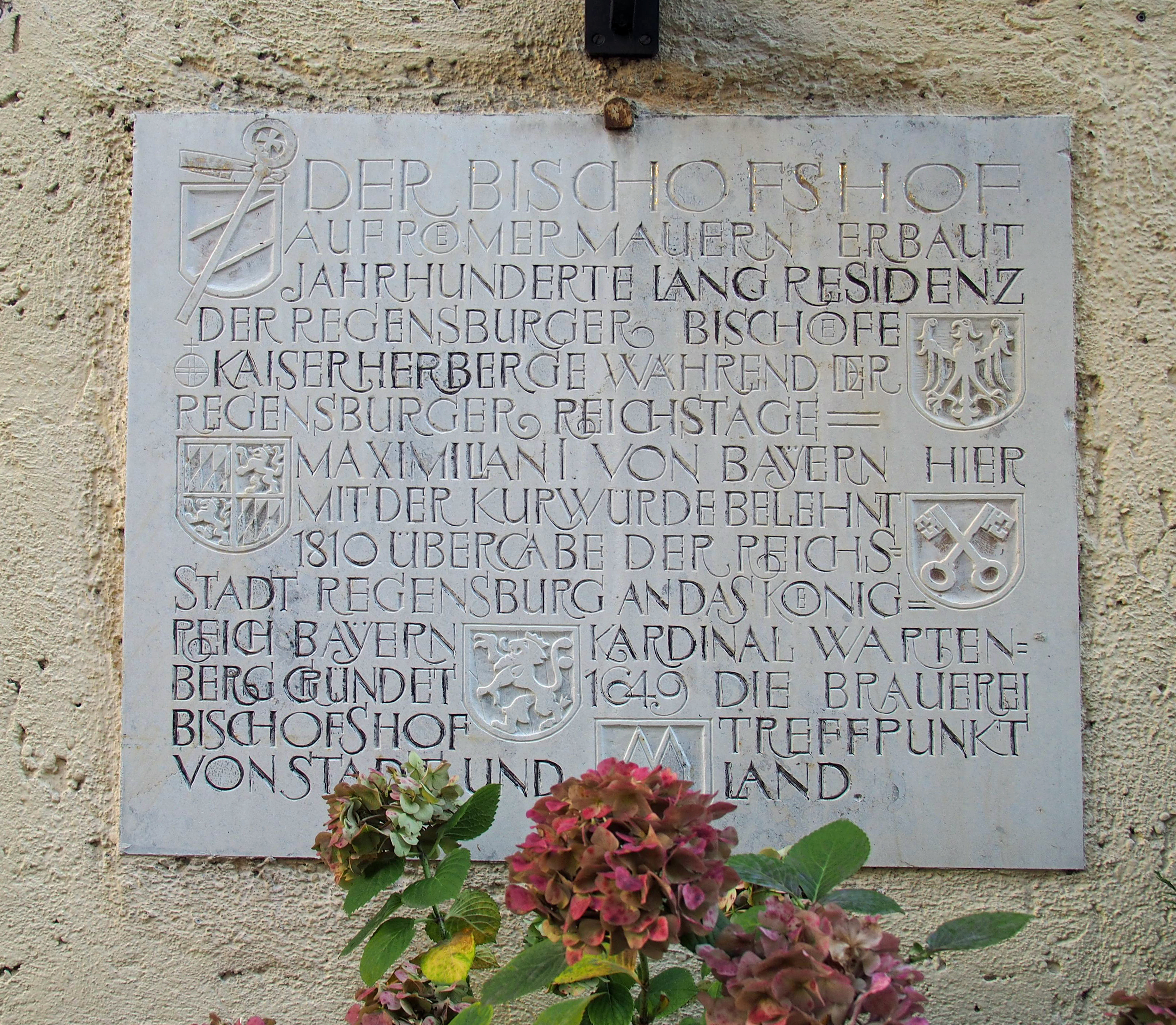 1=Infoschild im Bischofshof in Regensburg